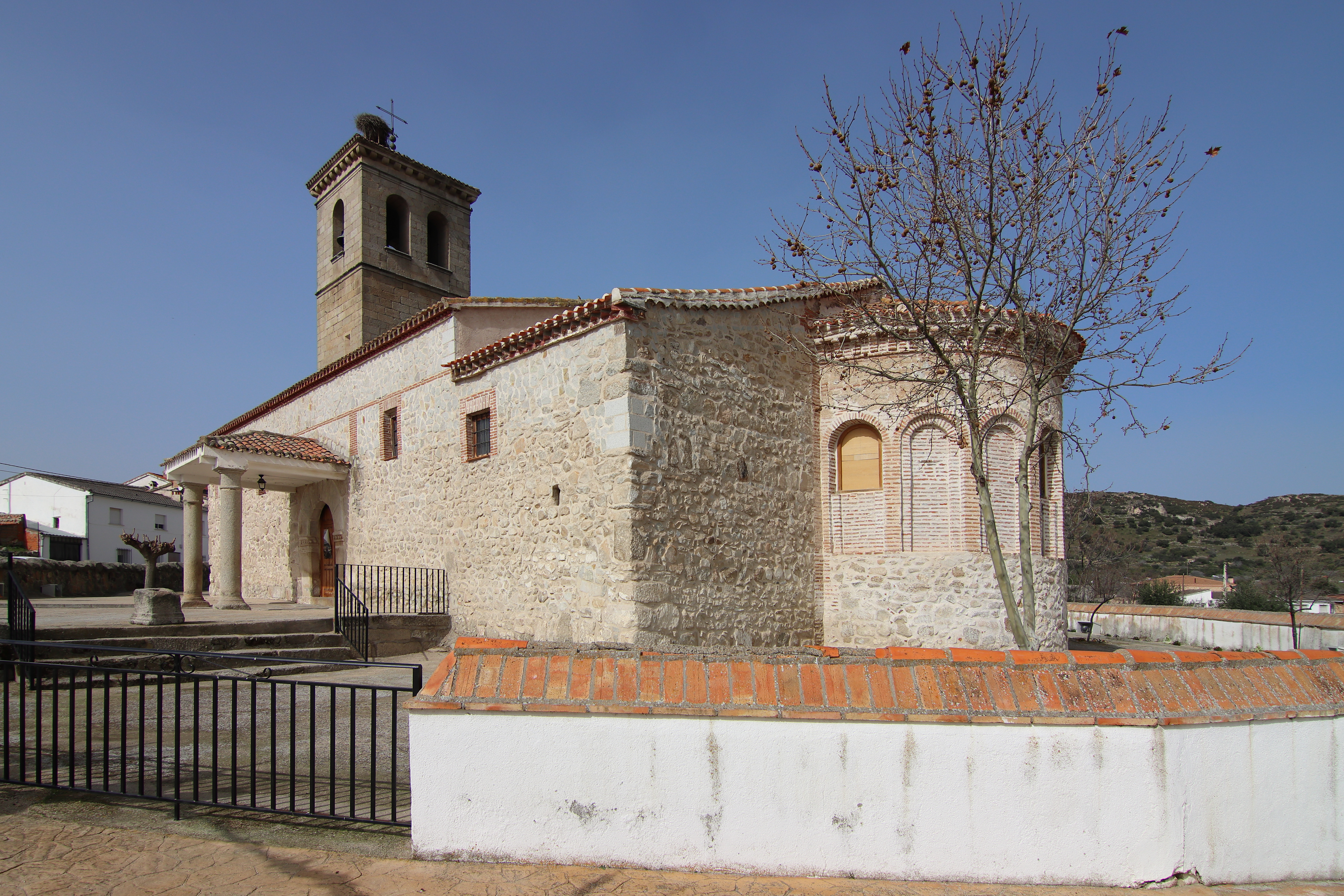 Iglesia de San Vicente Mártir, Paredes de Escalona, fachada este y ábside